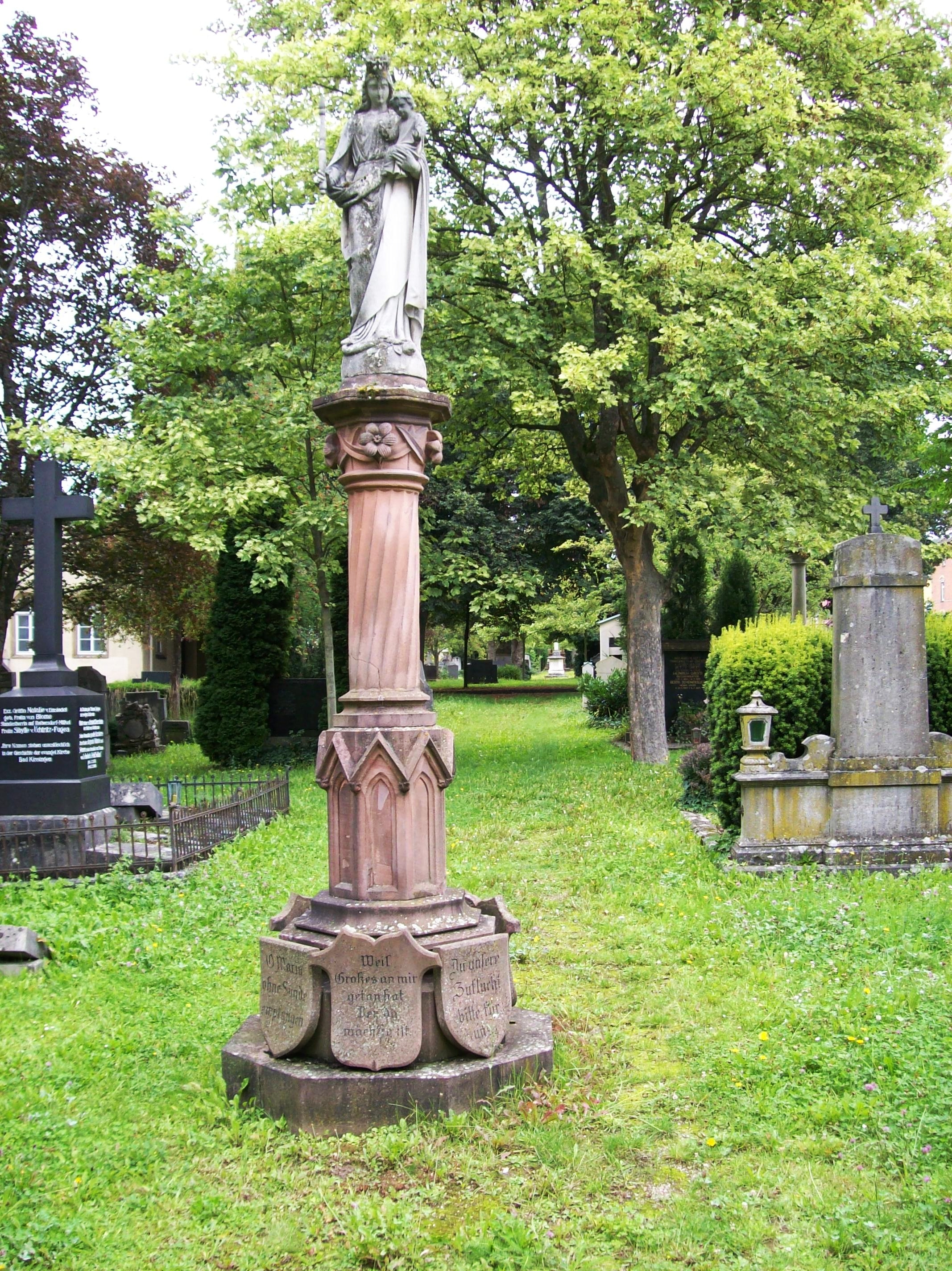 97688 Bad Kissingen, Germany